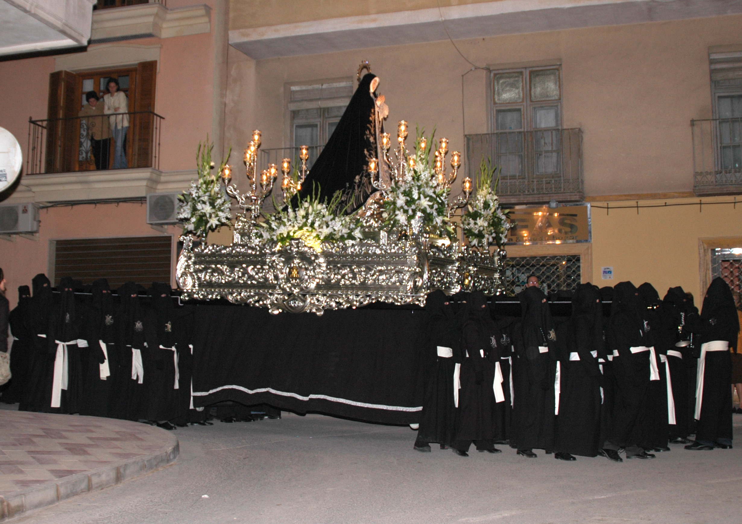 Trono Ntra Sra de la Soledad en procesión el Miercoles Santo de 2007